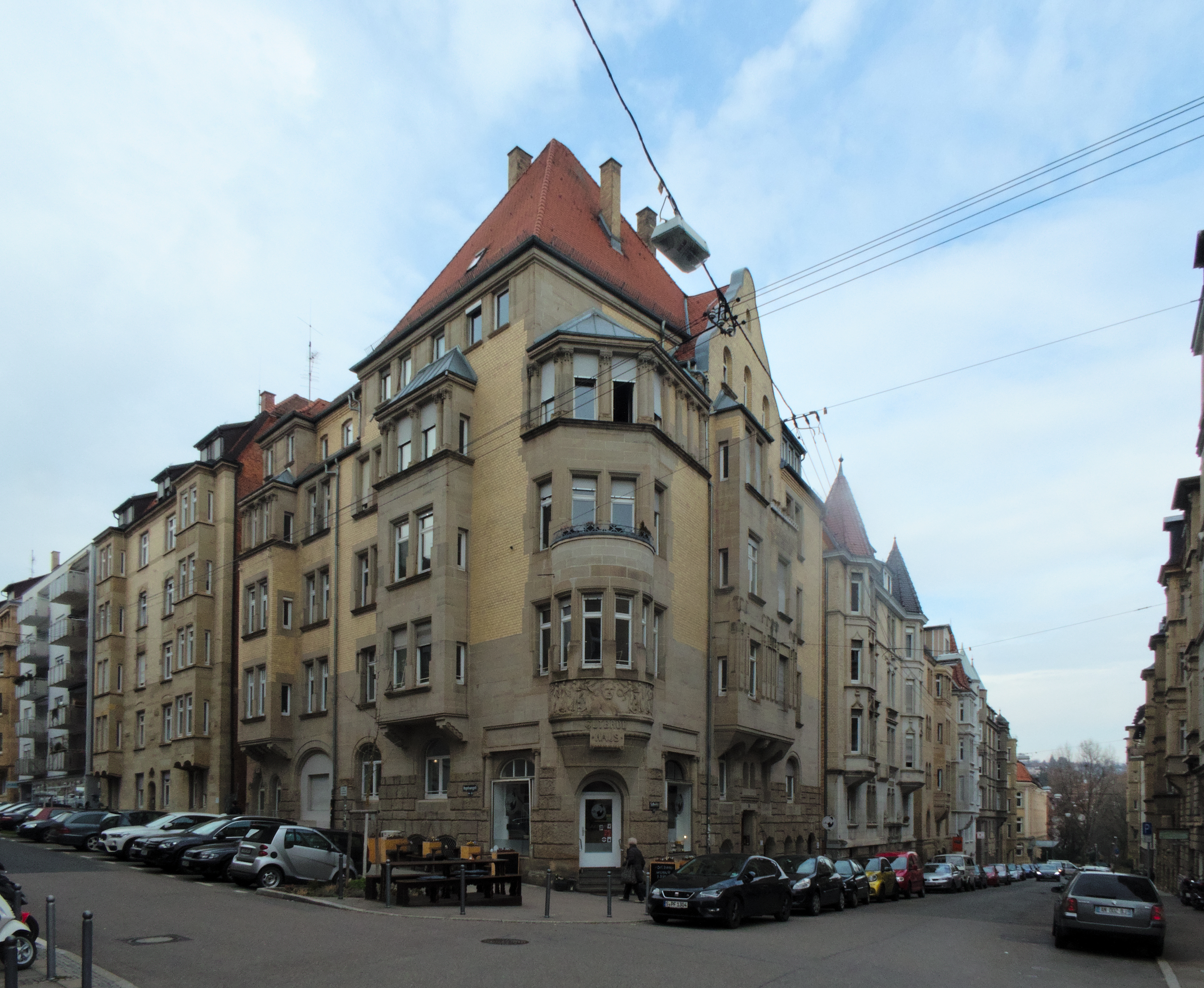 Wohn- und Geschäftshaus Gutbrodstraße 1, Stuttgart. Erbaut 1903-1904 von Kärcher und Barth im Historismus bzw. Jugendstil. Teil einer Sachgesamtheit. Geschützt nach § 2 DSchG.